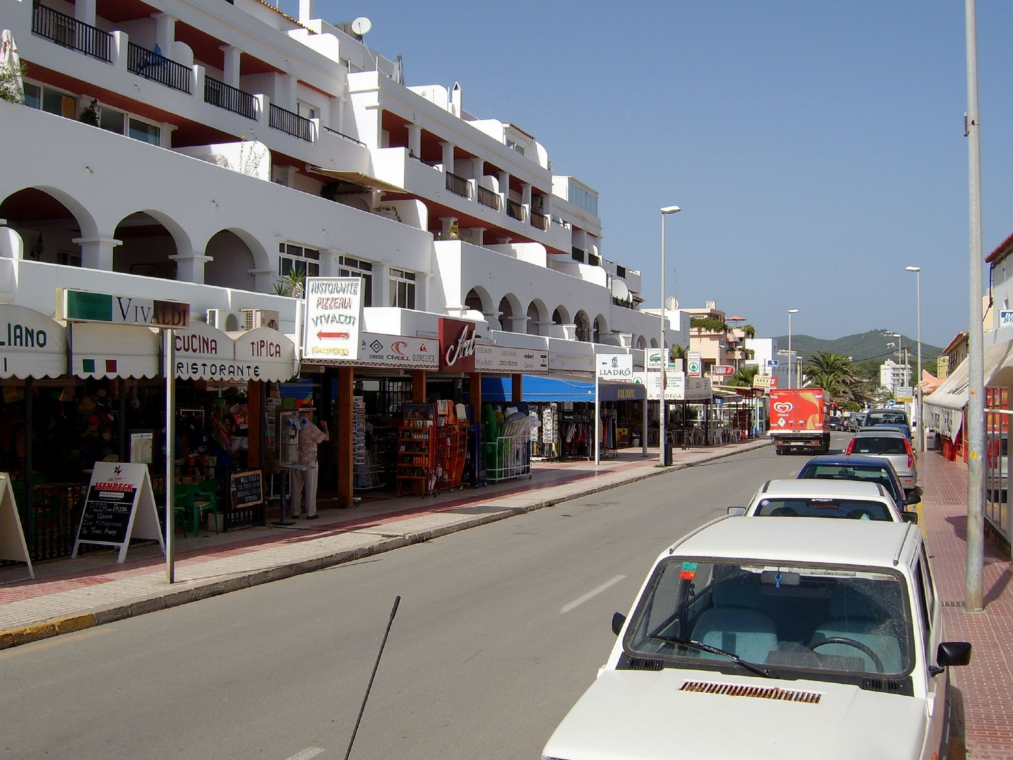 Ibiza 2005 - backstreets